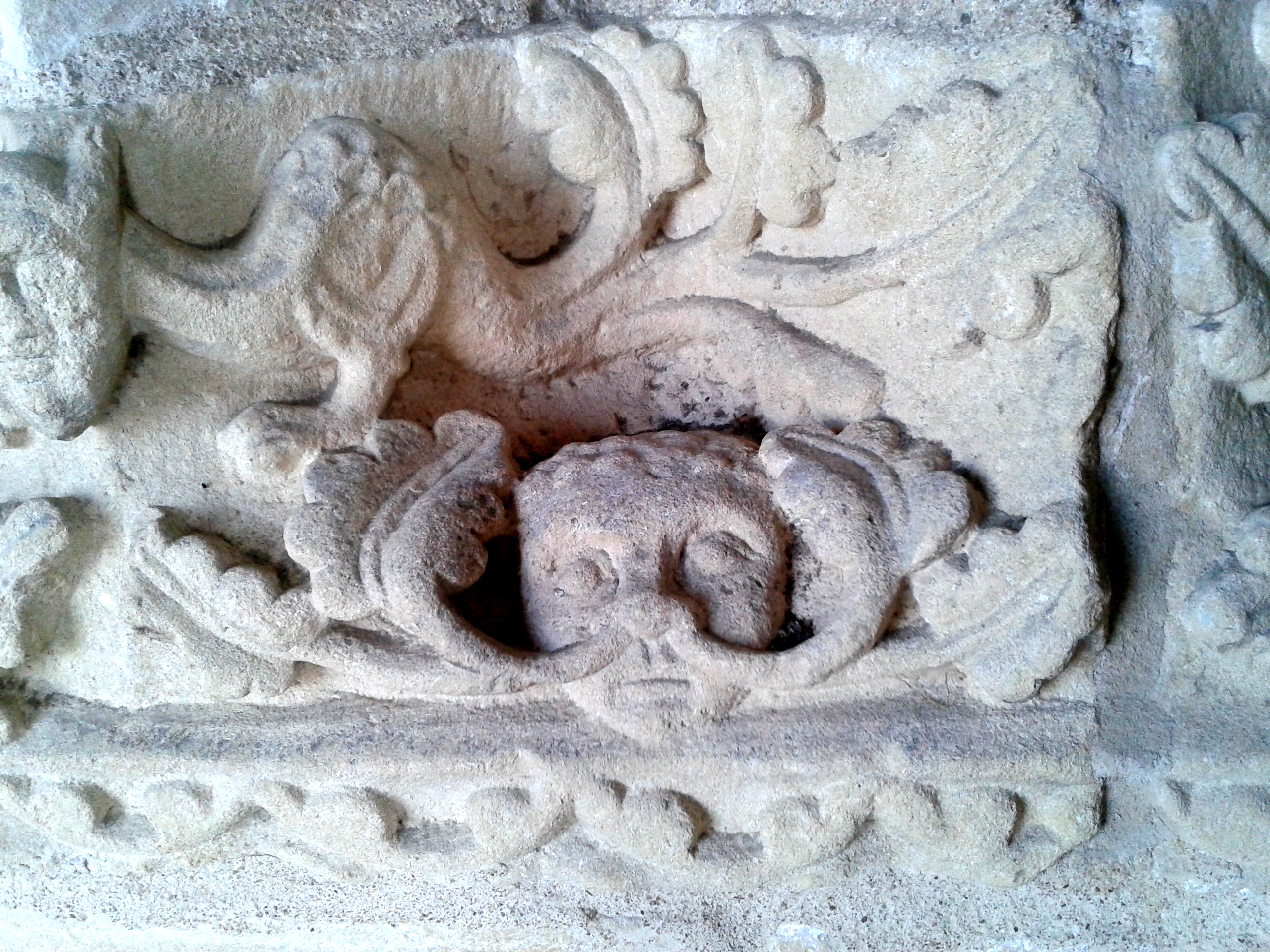 Blattmaske Candes Saint Martin Portal Stiftskirche